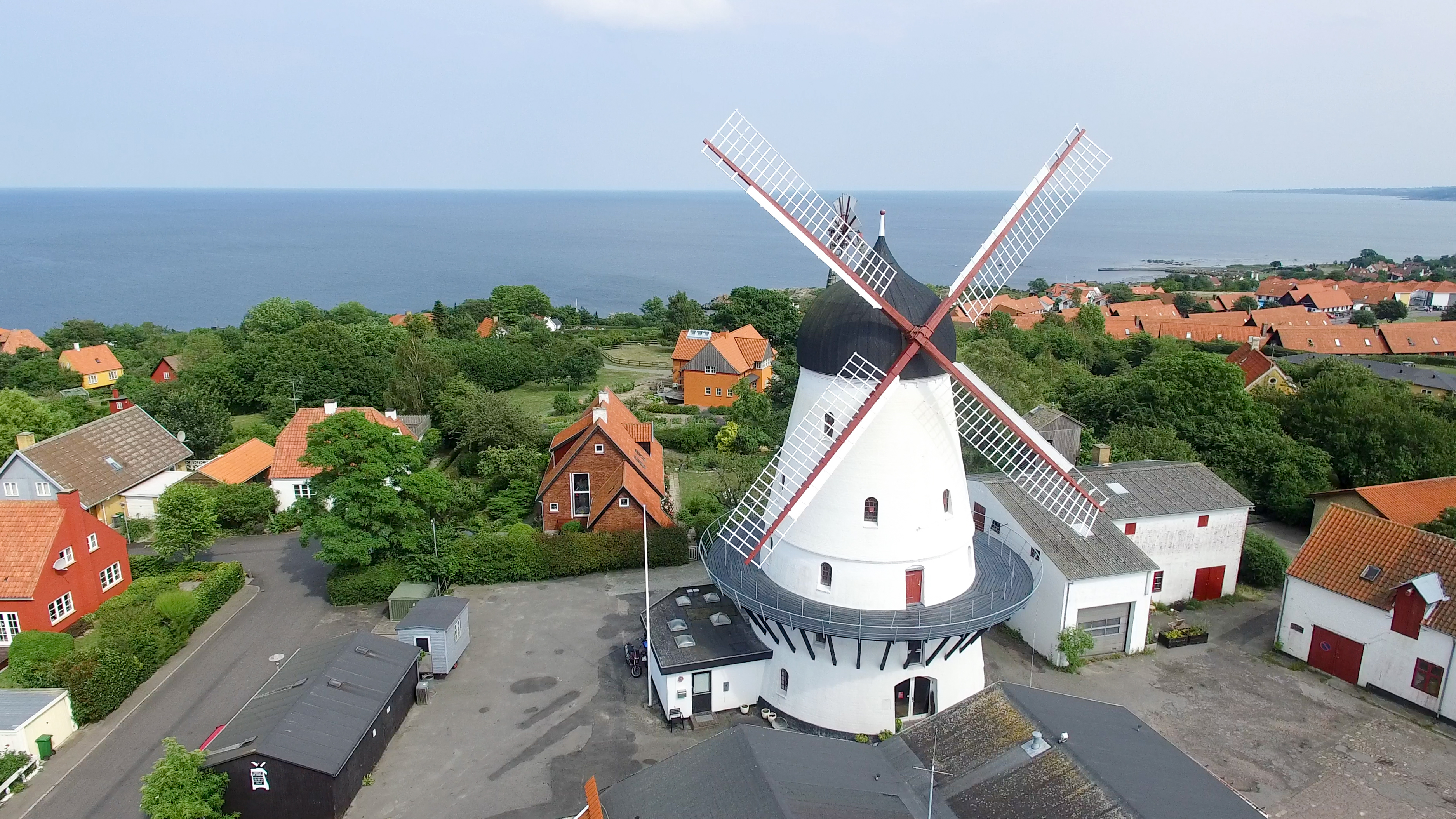 Gudhjem Windmill in Denmark